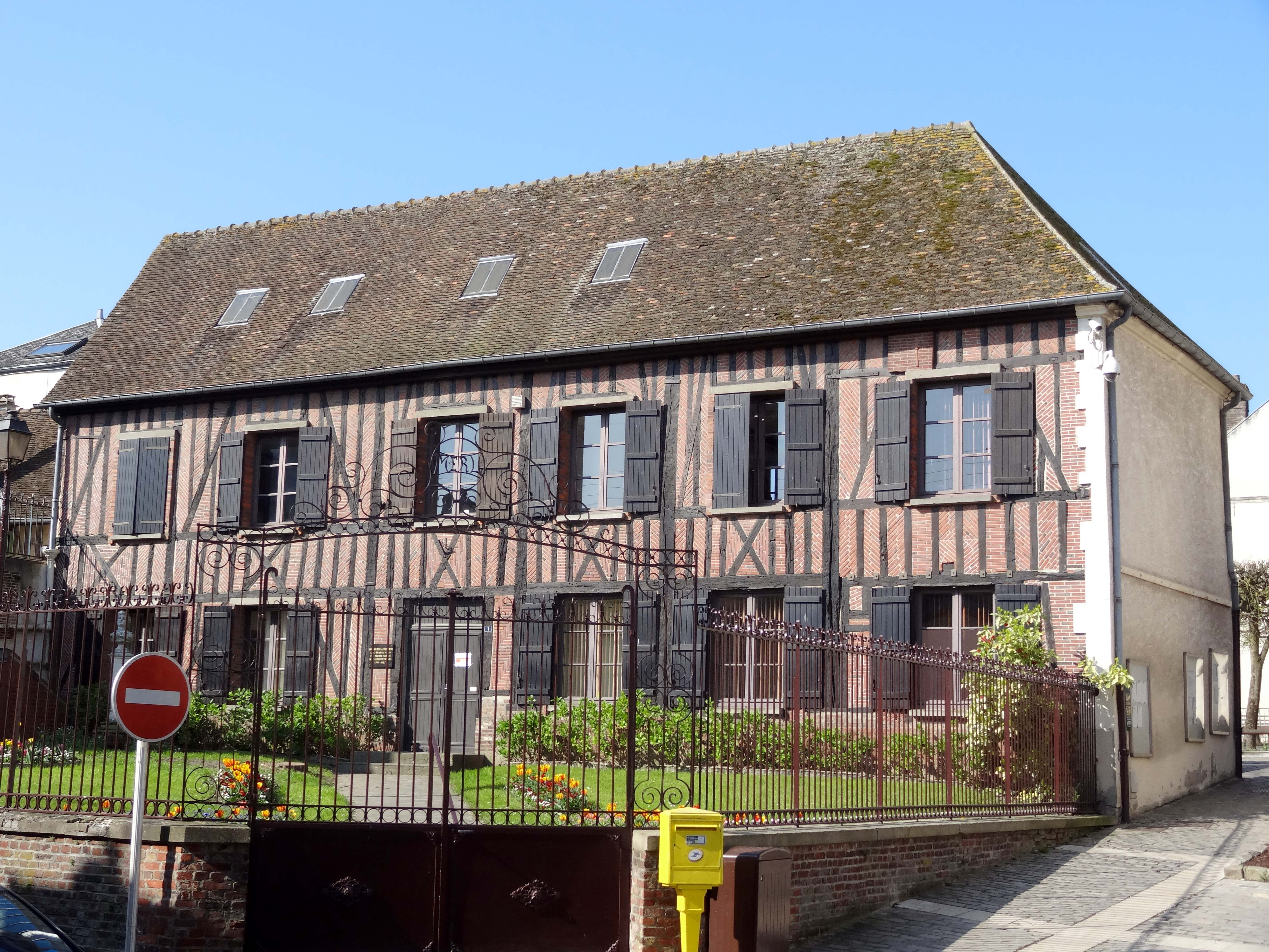 Parc de la ville.